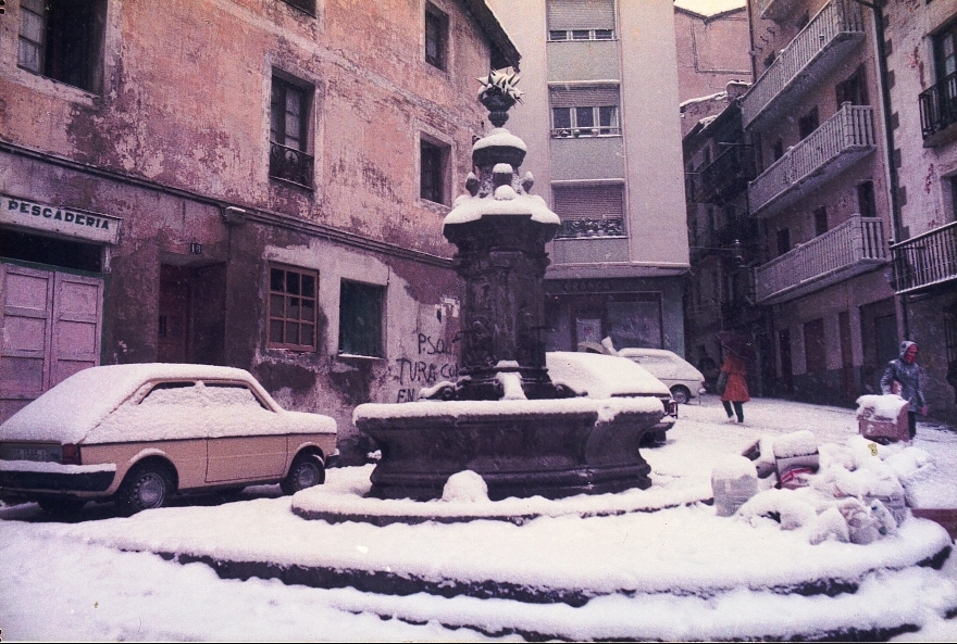 Fountain of San Juan (Zumaia - Gipuzkoa - Spain)